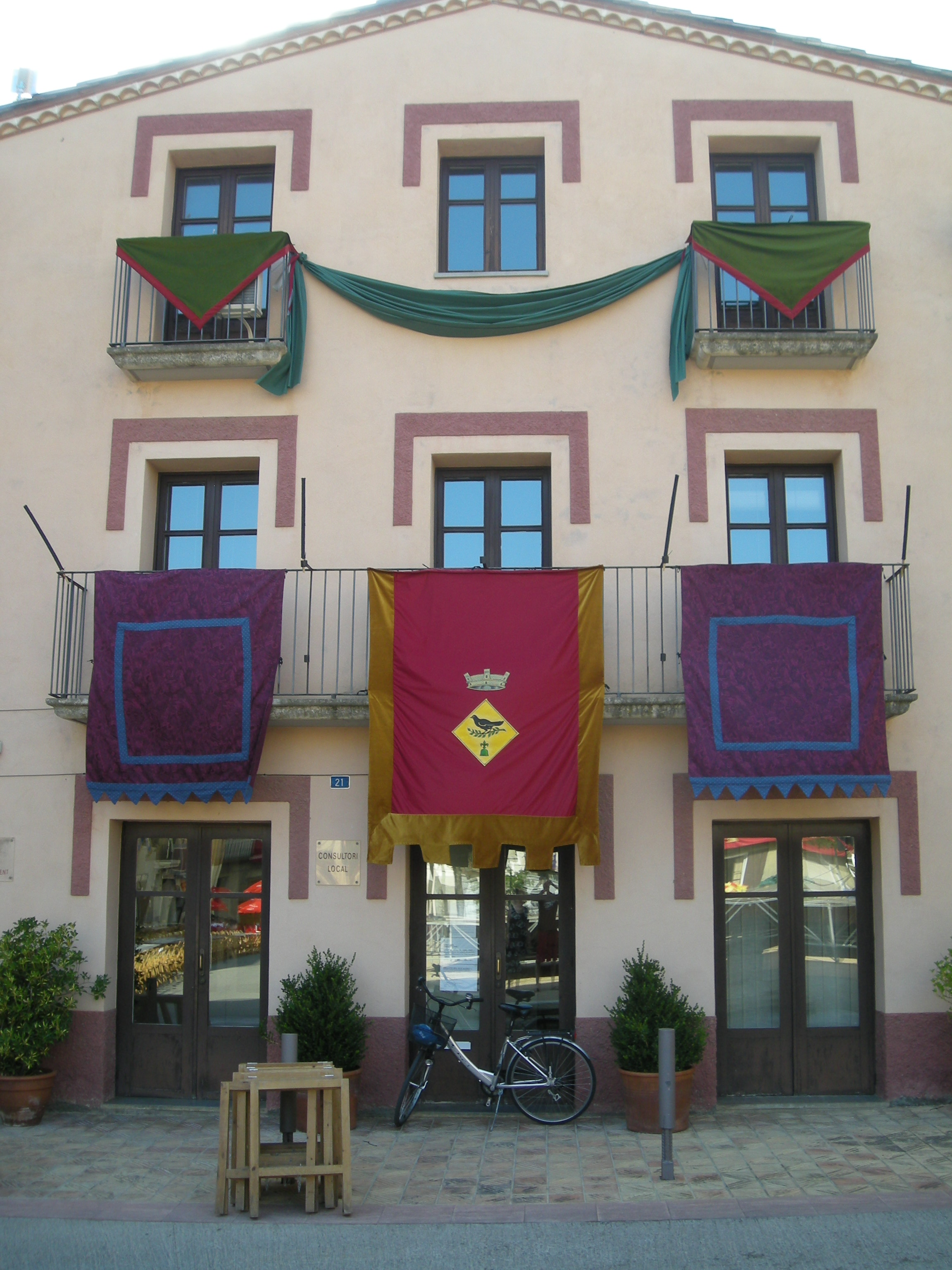 Ajuntament de Tortellà per la festa major 2008